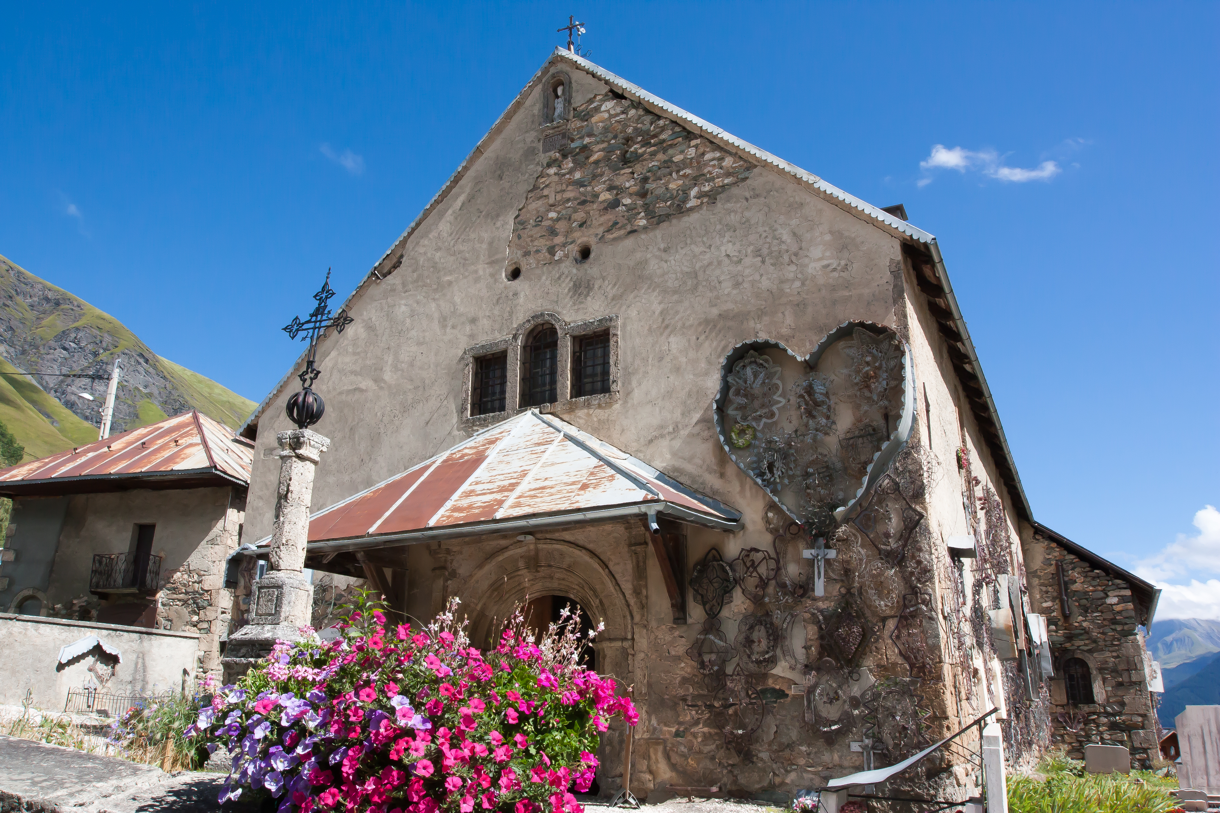 Exterieur de l'église Saint-Saturnin de Saint-Sorlin-d'Arves / Saint-Sorlin-d'Arves / Savoie / France